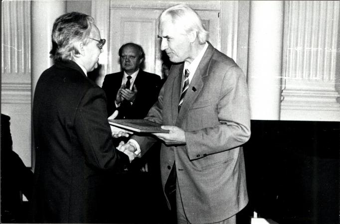 PF0015 TÜ EMSA. Rektor Arnold Koop õnnitlemas 60-aastast Huno Rätsepat. Taustal Ants Kallikorm.